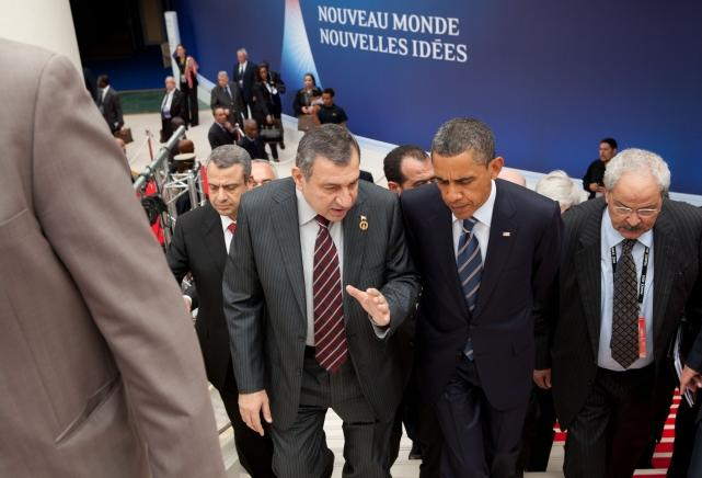 Le Président américain Barack Obama et le premier ministre égyptien Essam Sharaf lors du G8 France 2011 à Deauville